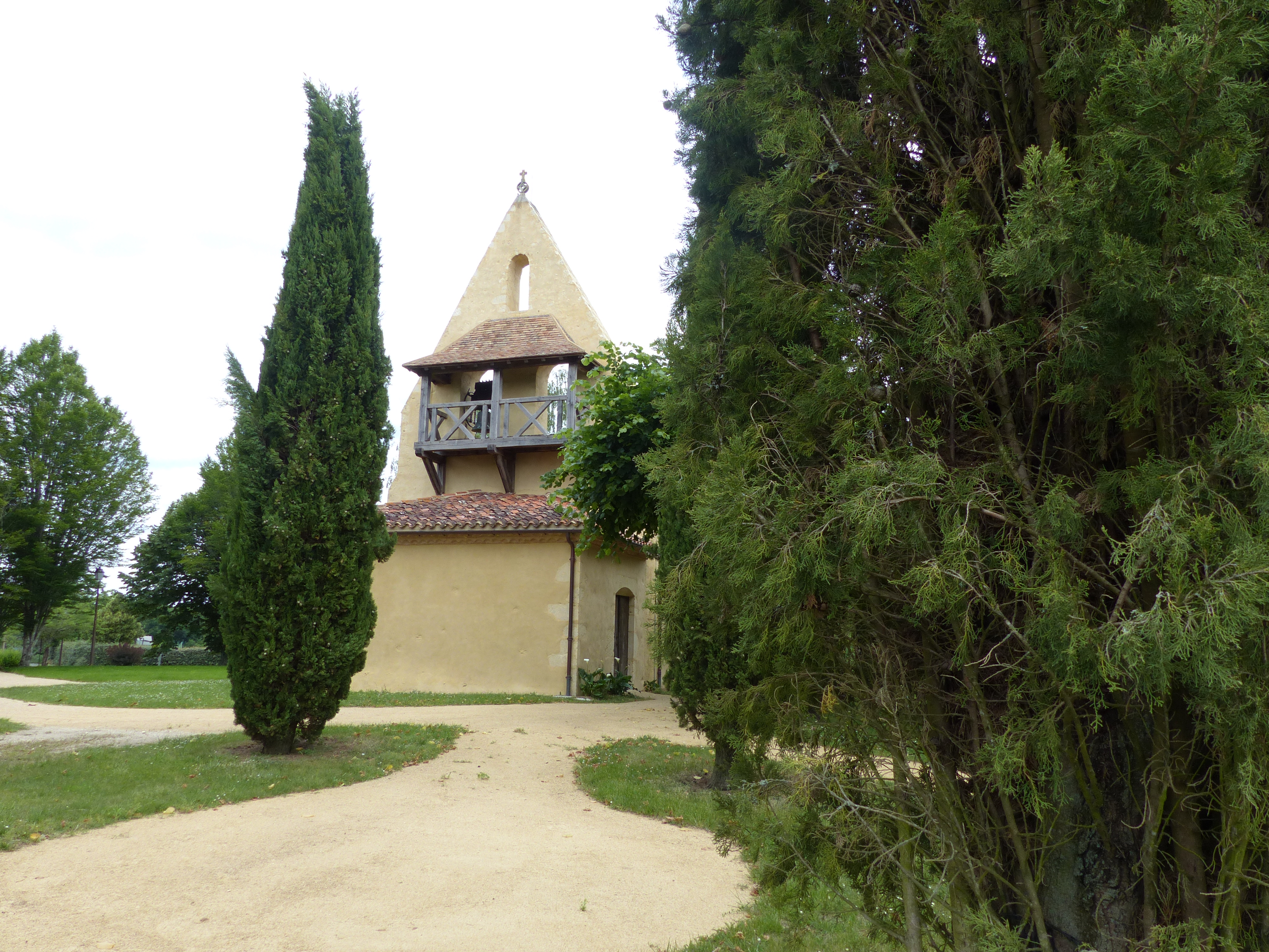 L'église de Saint-Julien (Landes, France)